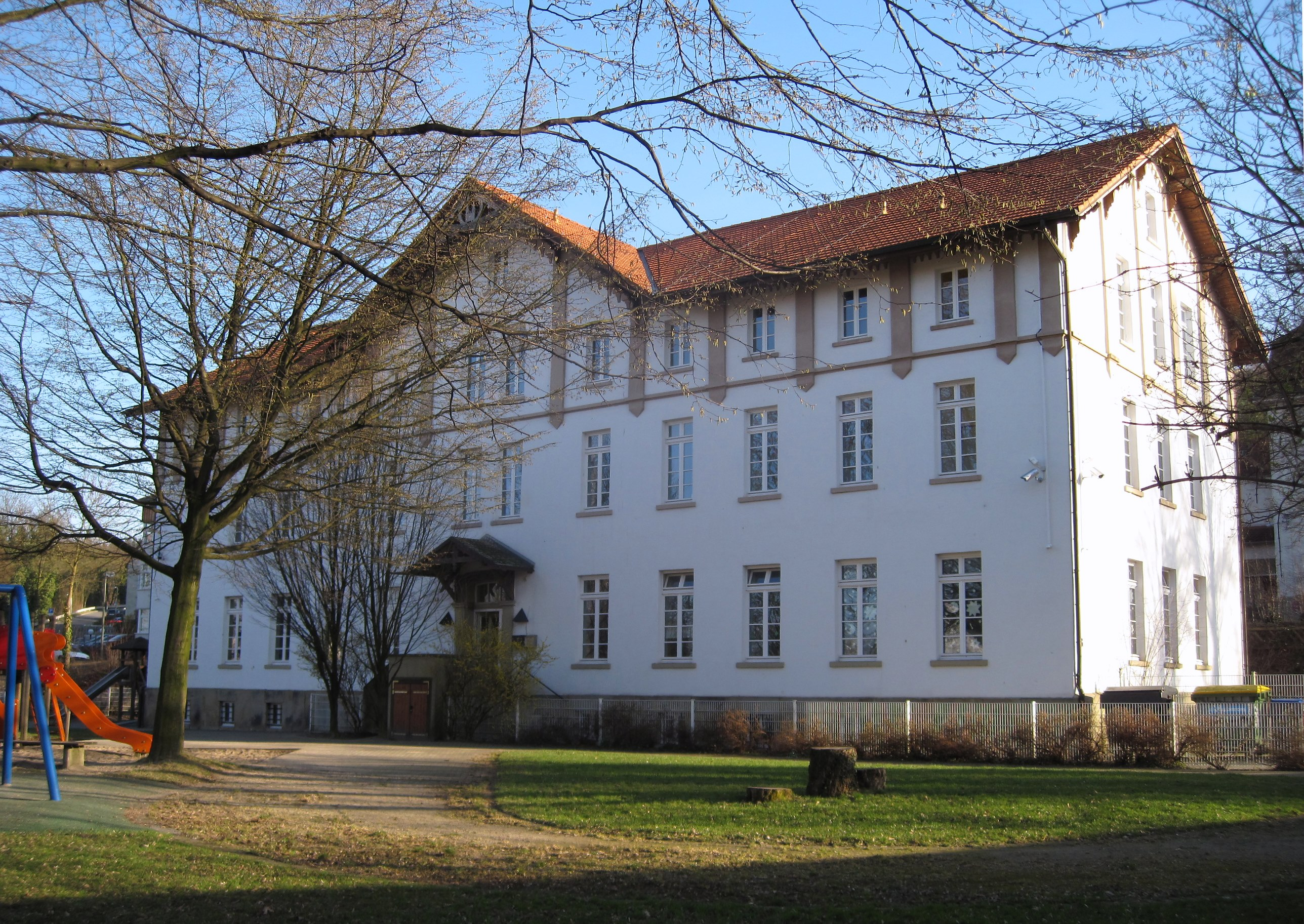 Ehemaliges Waisenhaus in Iserlohn, Waisenhausstraße 5. Denkmal seit 26. November 1986.